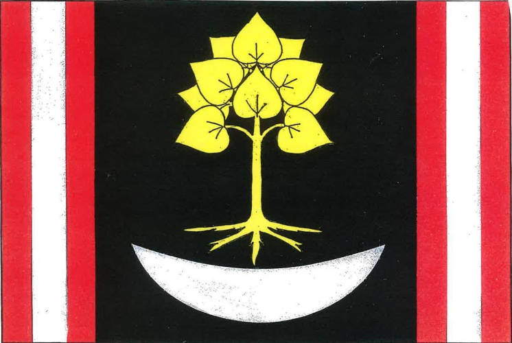 vlajka, Lhotice, okres Třebíč